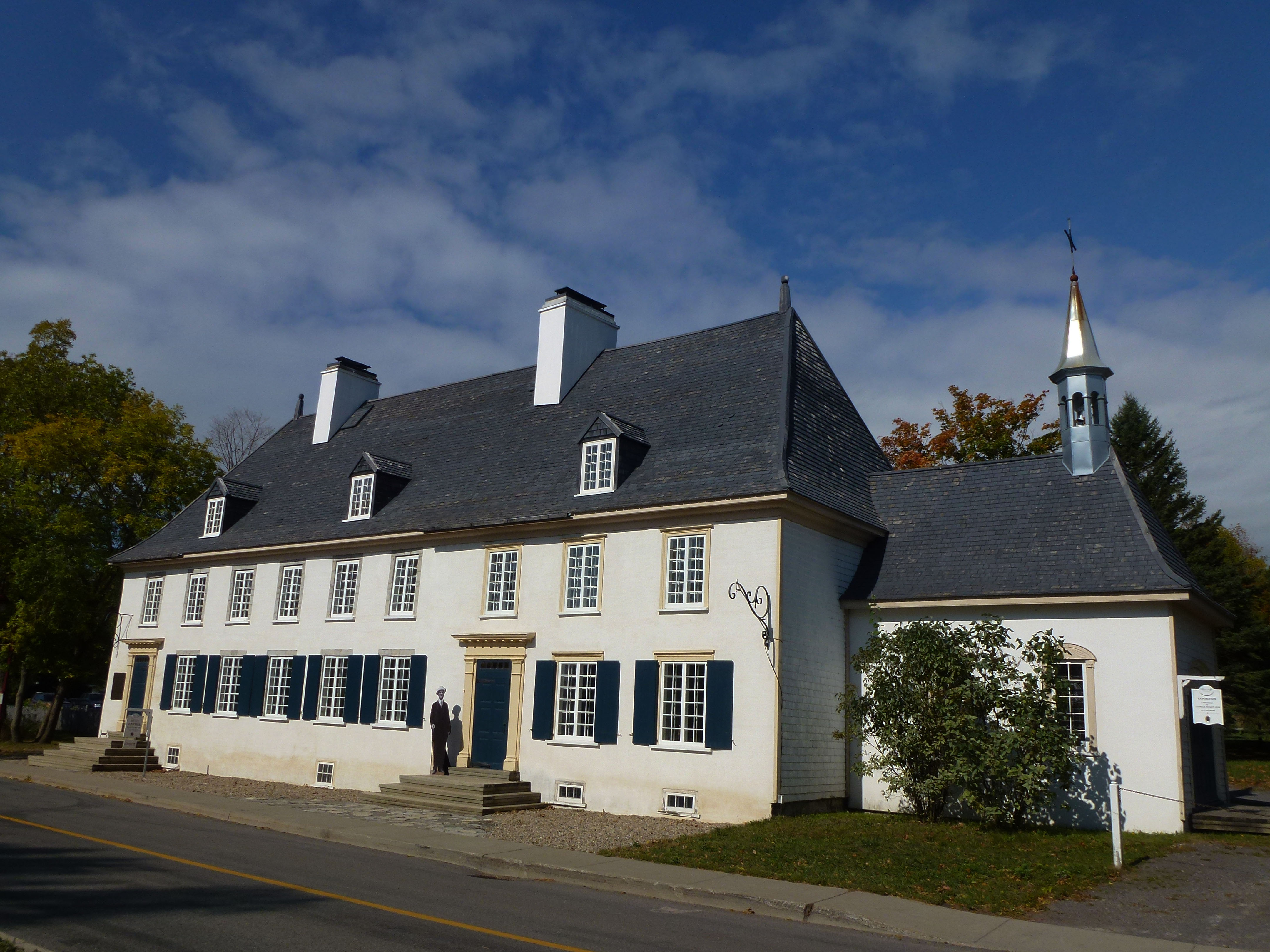 Manoir Mauvide-Genest, 1451, chemin Royal, Saint-Jean-de-l'Île-d'Orléans (Canada). (Protection MH classé. Voir la liste des lieux patrimoniaux de la Capitale-Nationale pour plus de détails).